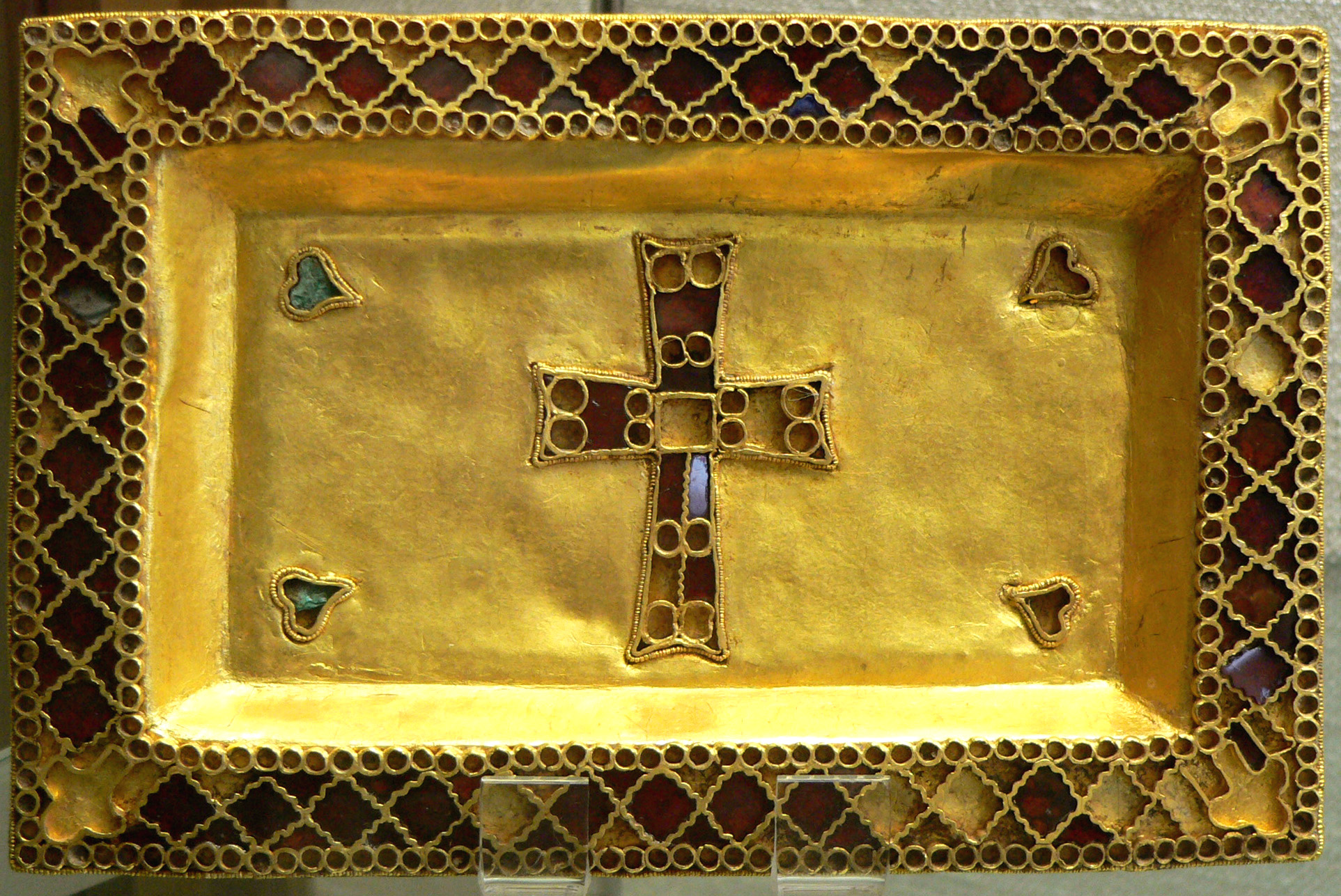 Trésor de Gourdon, patène Trésor découvert près de Gourdon (Saône-et-Loire), en 1845. Or, turquoise et grenats cloisonnés, fin du Ve-début du VIe siècle.